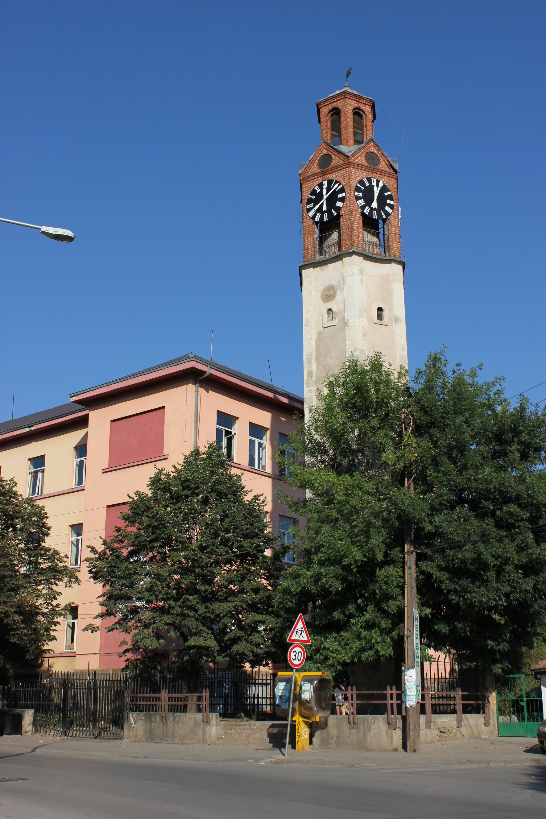 Uhrturm (Sahat kula) in Priština.Hornjoserbsce: Časnikowa wěža w Prištinje.